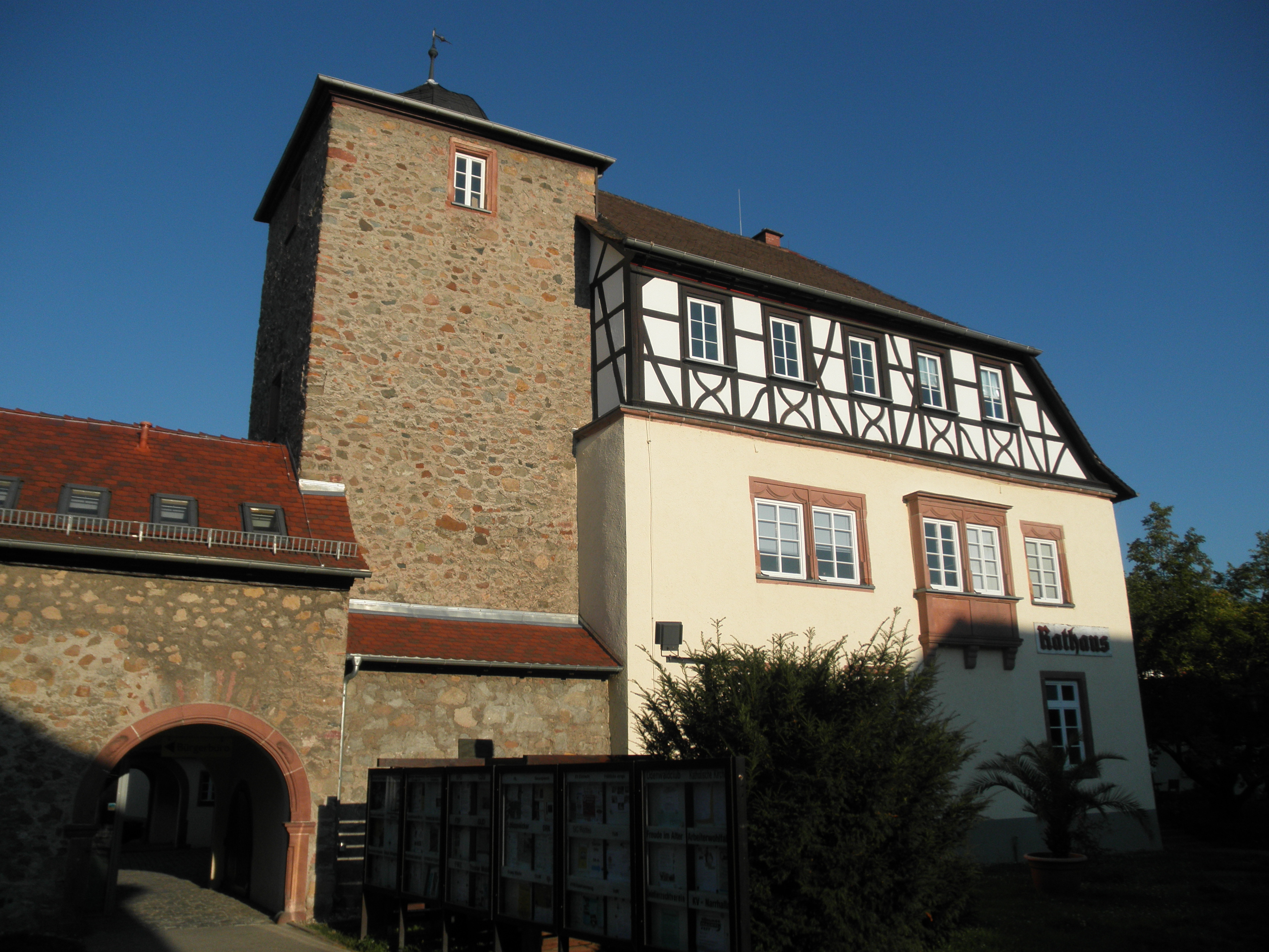 Zwingenberg: kasteleto kaj urbodomo Untergasse 16 (monumenta n-ro Zwingenberg 72)